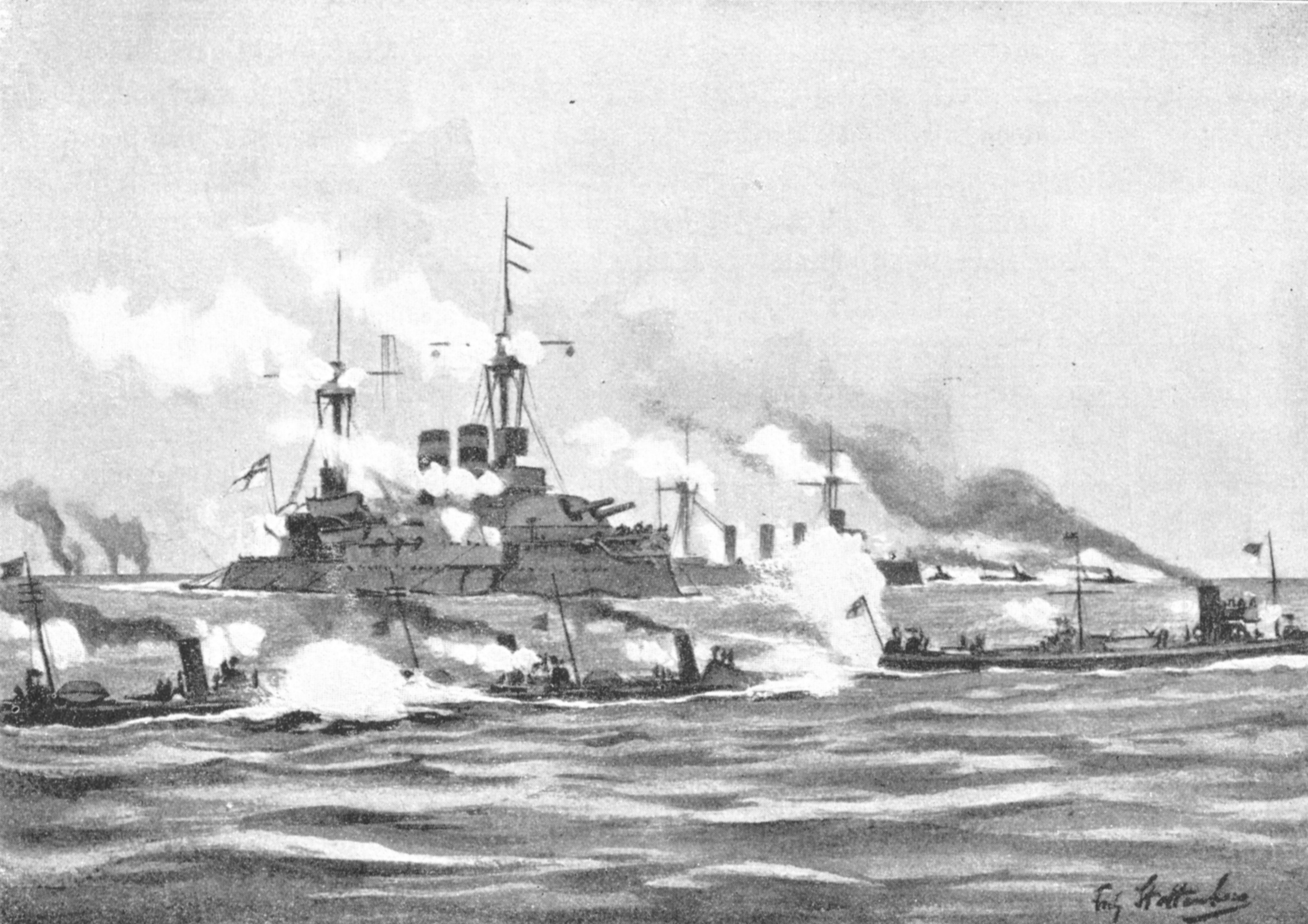 Eine Torpedobootdivison, ein Panzerschiff und ein Kreuzer angreifend, Zeichnung von Fritz Stoltenberg um 1895